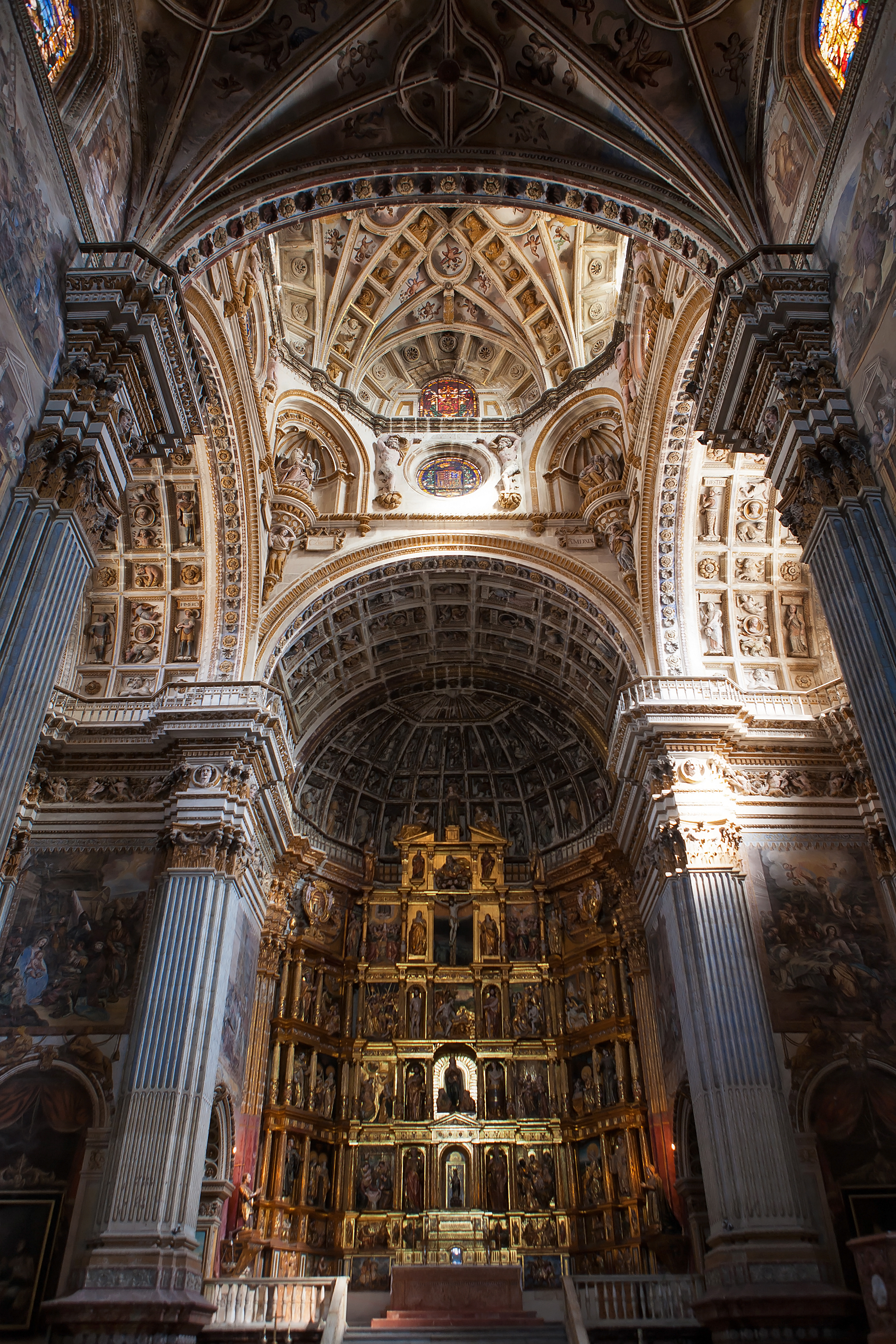 Iglesia de San Jerónimo, Granada